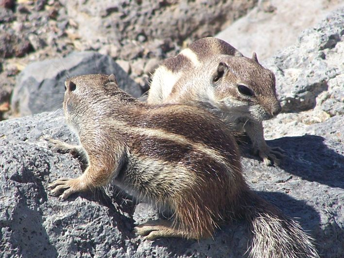 Streifenhörnchen